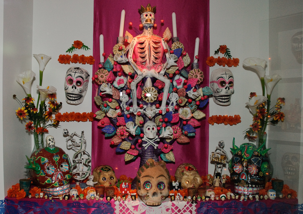 Allerzielen-Altaar Mexico Allerzielenaltaar